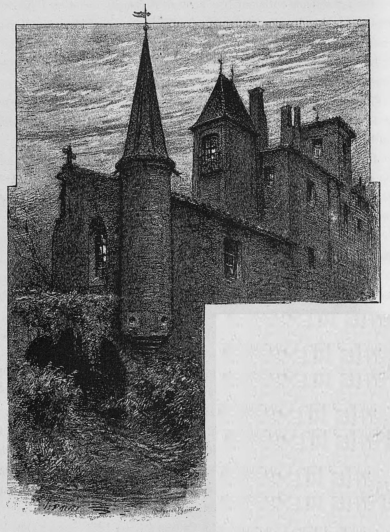 Aux environs de Lyon / Monsieur Josse ; préface de M. Coste-Labaume ; édition illustrée de 250 dessins de J. Drevet.